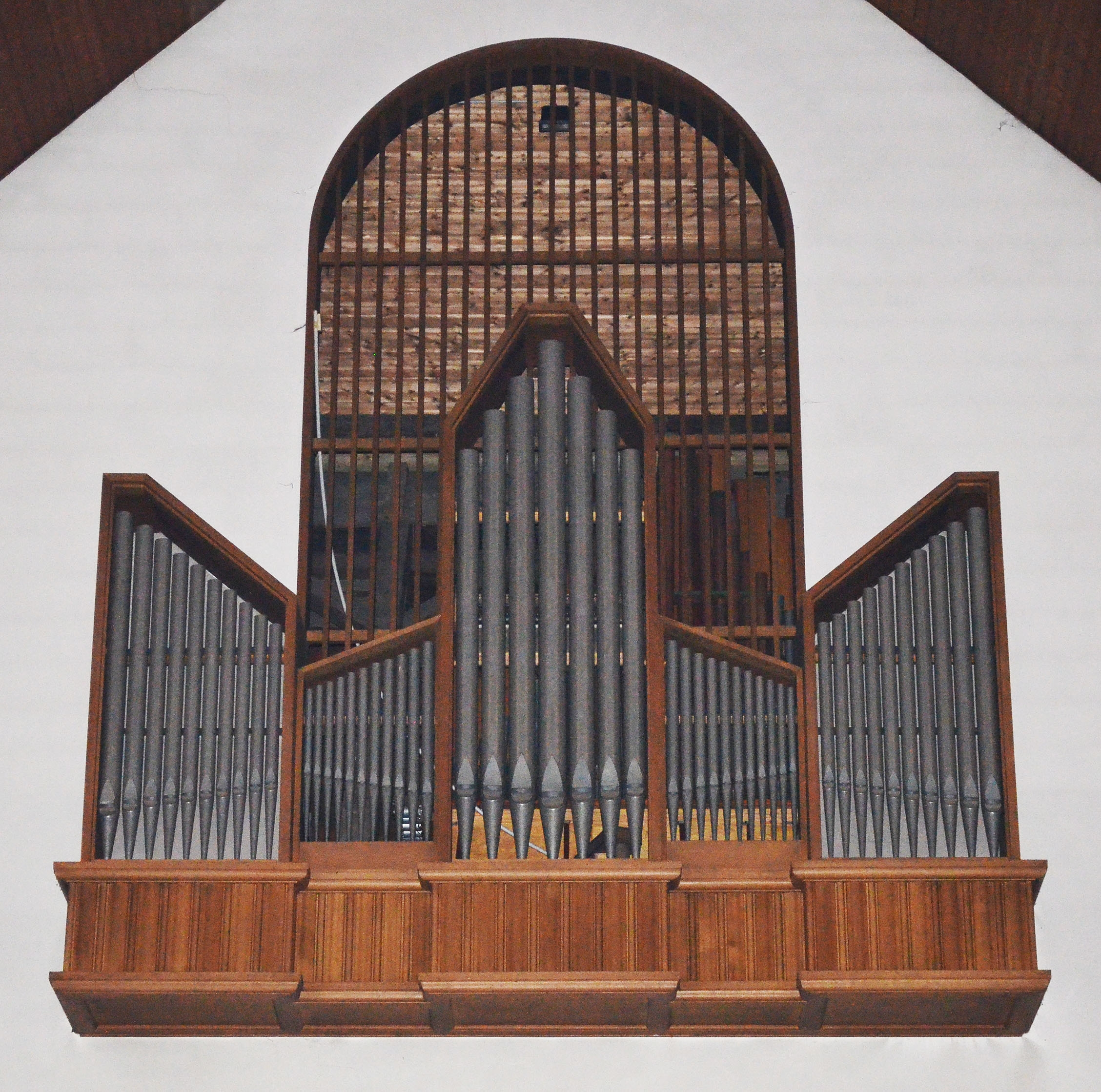 Alme, St. Ludgerus, Orgelgehäuse mit Pfeifen